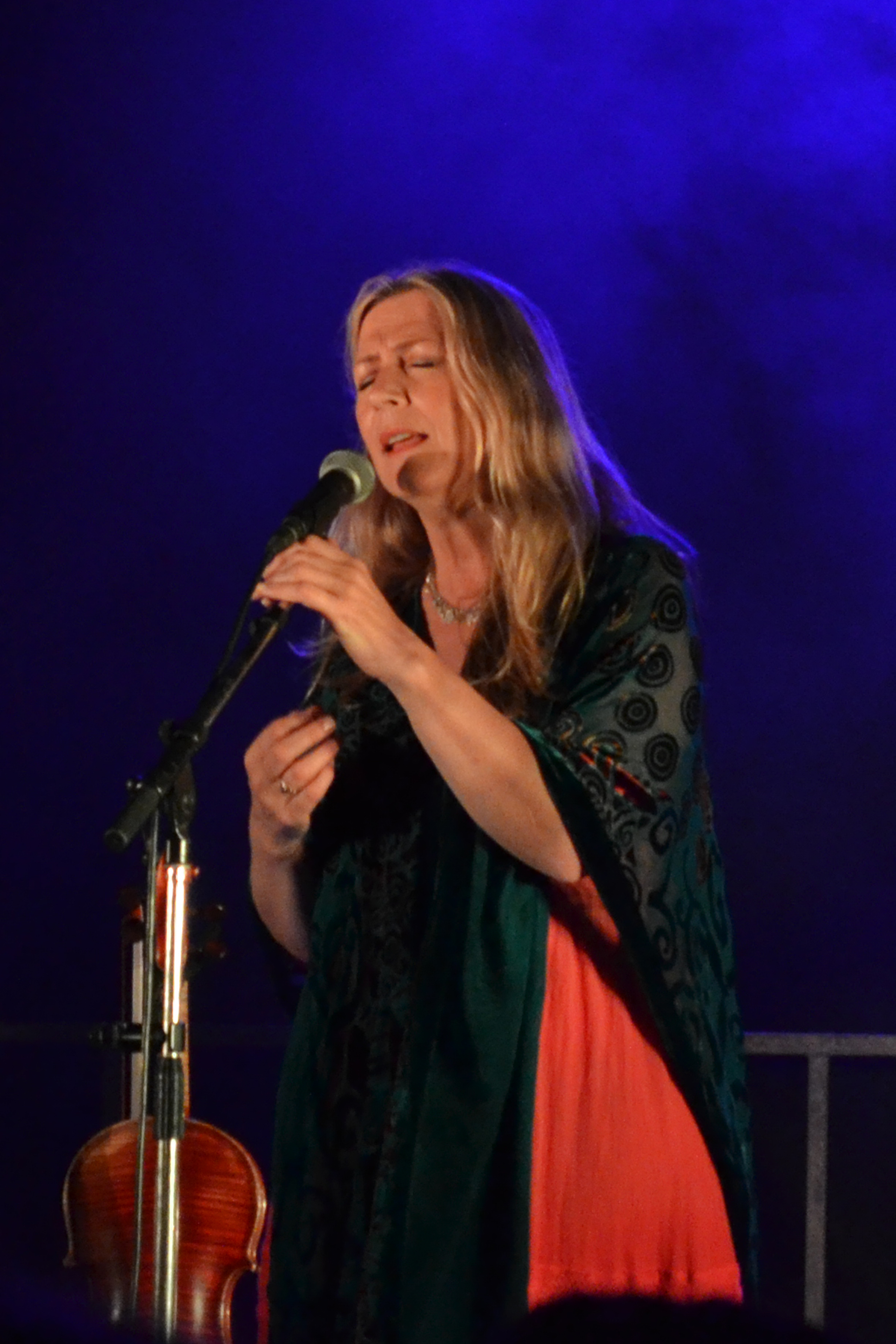 Le groupe irlandais de musique traditionnelle Altan en concert lors des Mardis de Plouescat (Nord Finistère, Bretagne, France) le 23 juillet 2013.